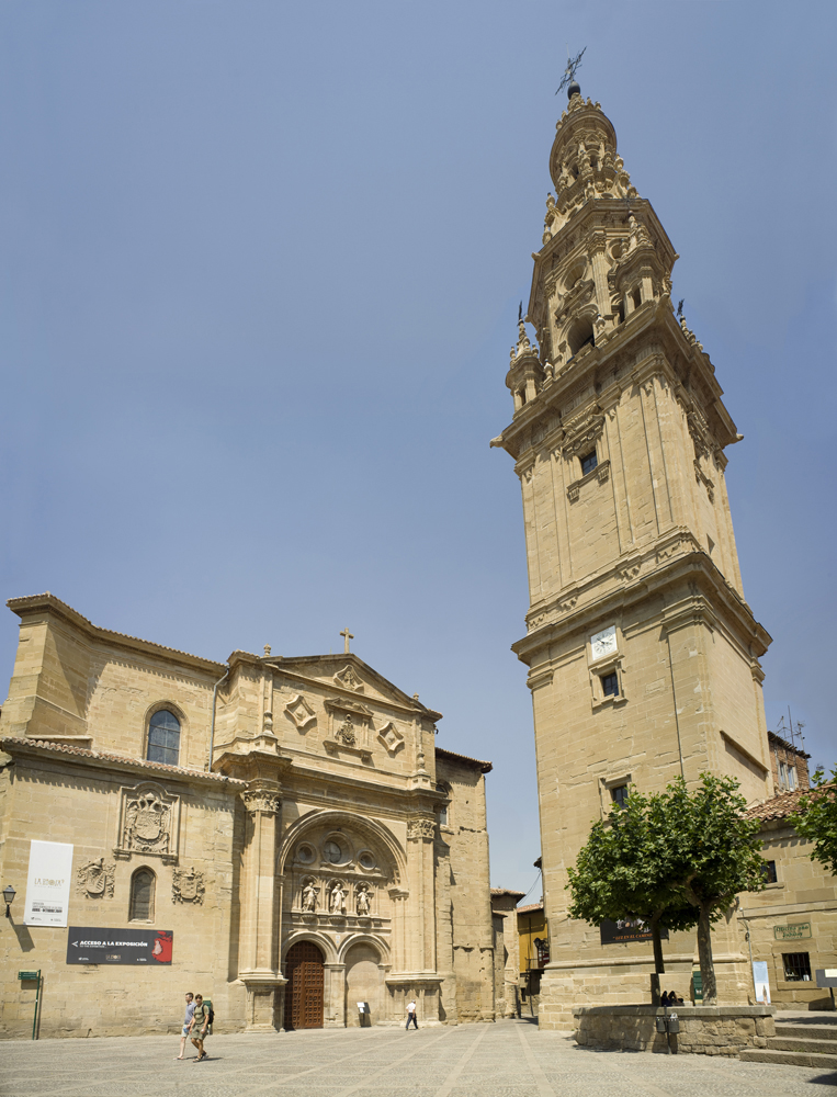 Cultural Heritage Spain RI-51-0000702